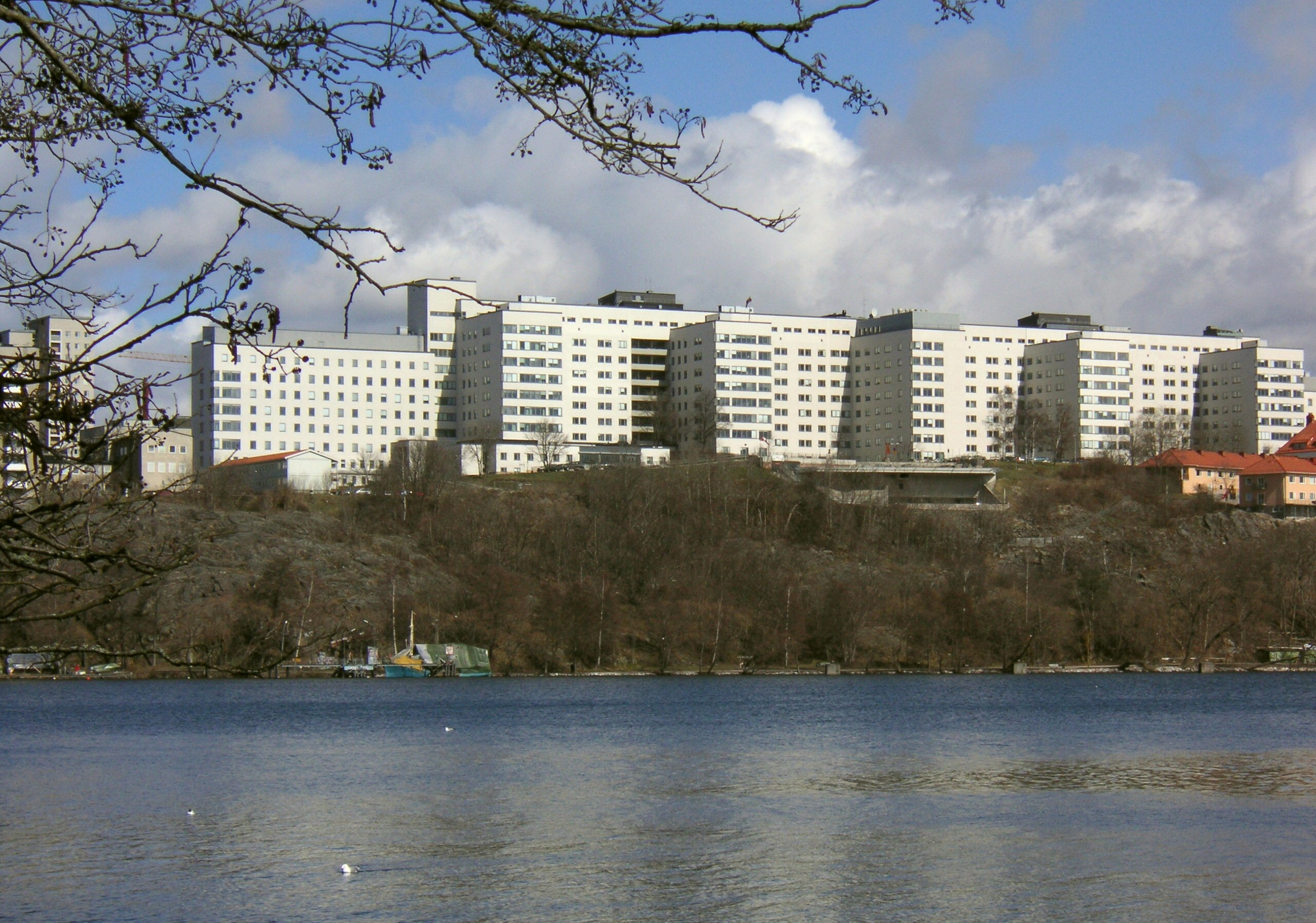 Södersjukhuset mot söder, vy över Årstaviken.